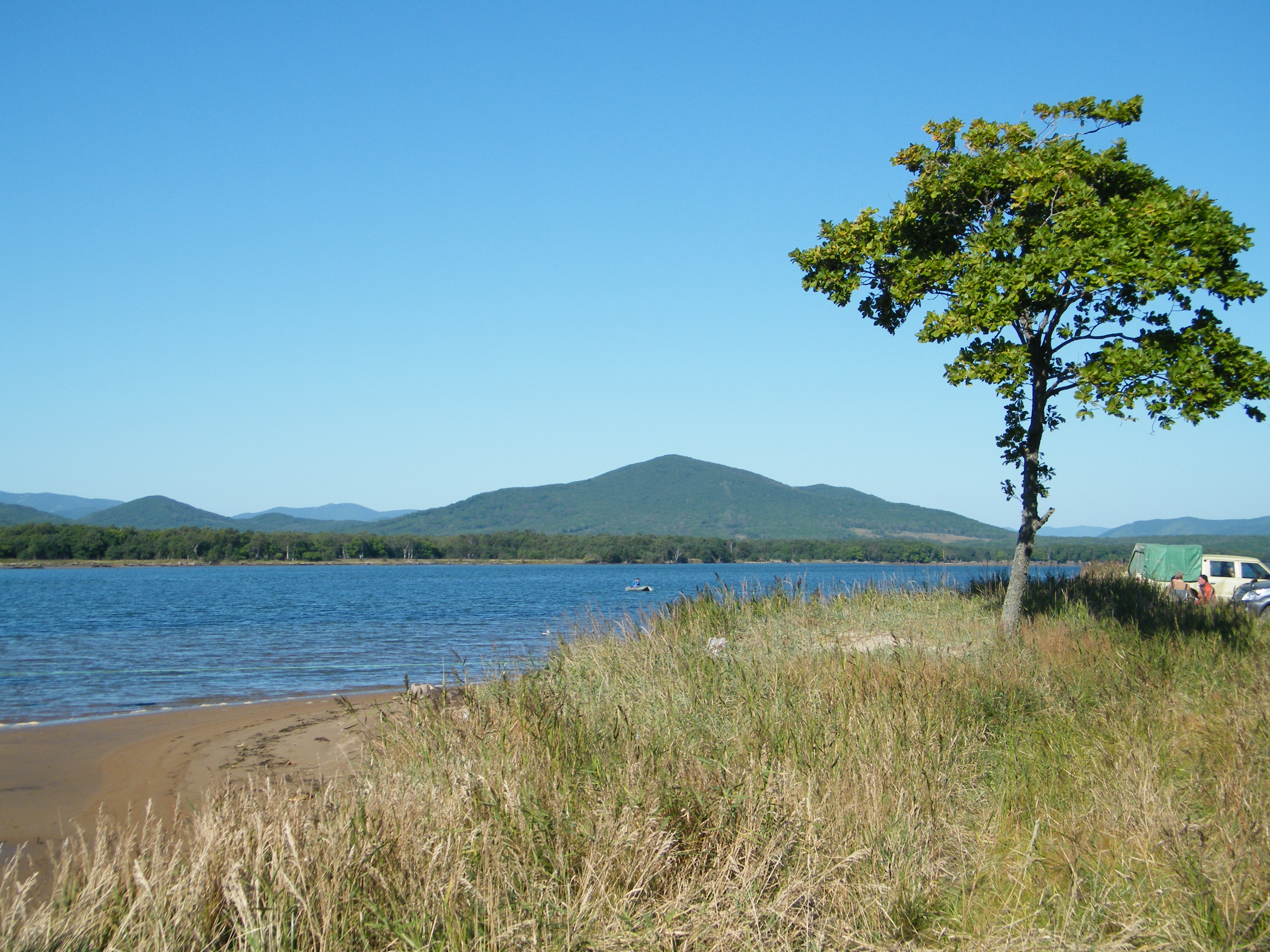 Река Аввакумовка. Народ ловит кету